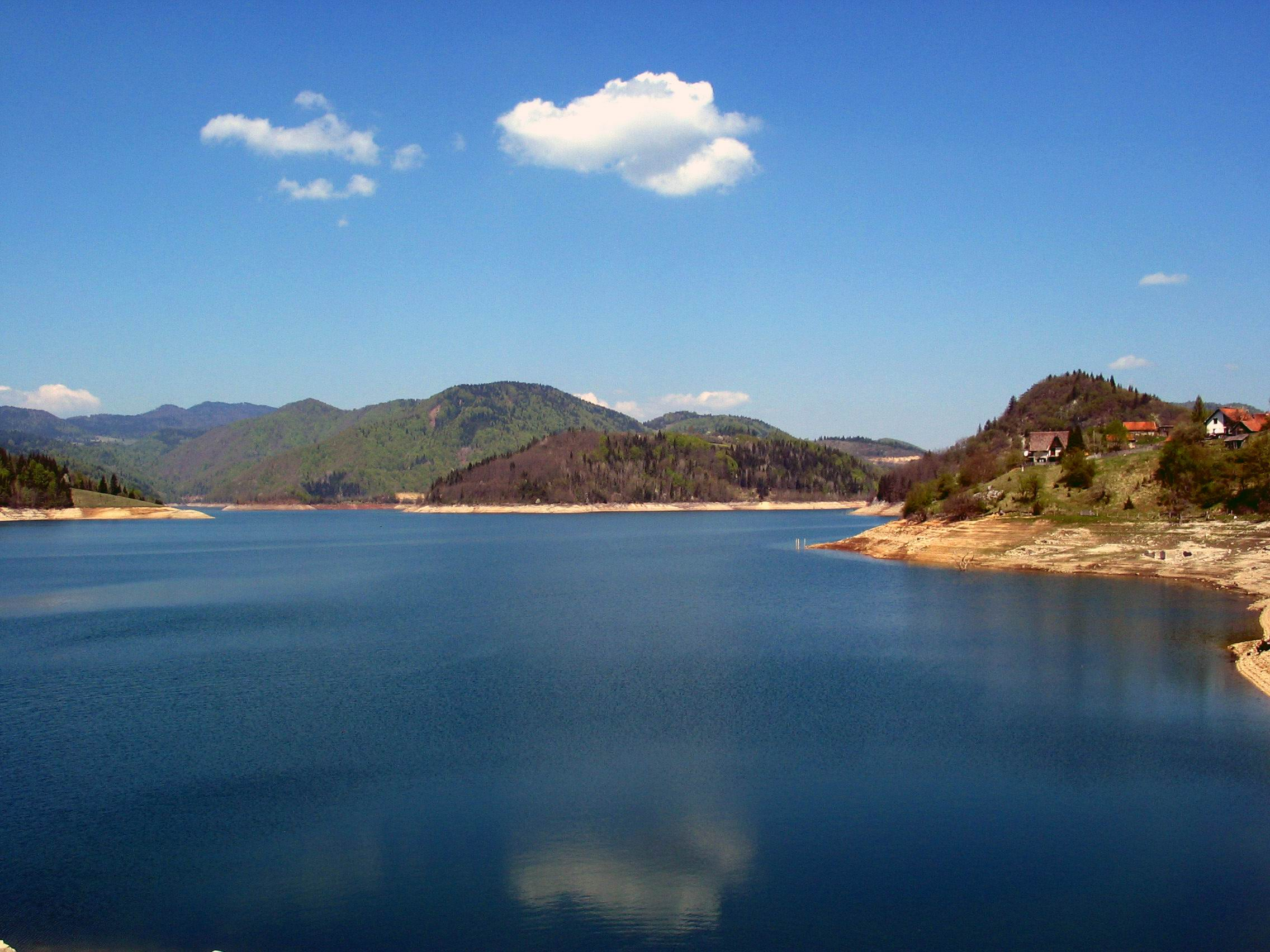 Zaovine Lake, /Le Lac de Zaovine, près de Zaovine, Serbie